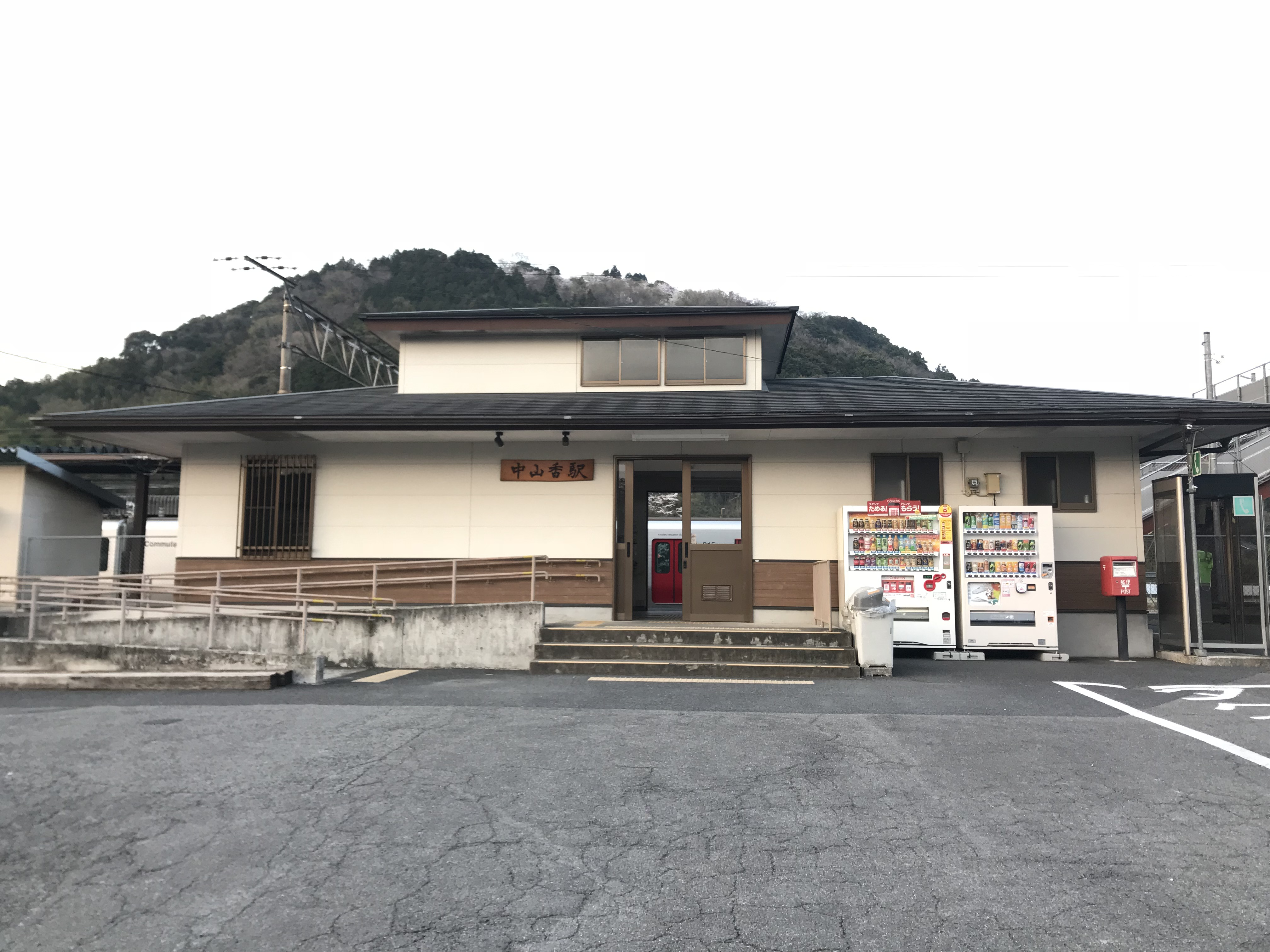 中山香駅の駅舎